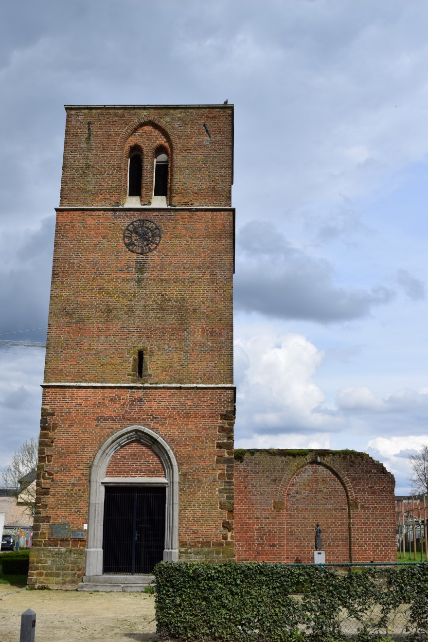 Herk-de-Stad Kiezelweg 119 Parochiekerk Sint-Jan de Doper - toren en bijgebouwen